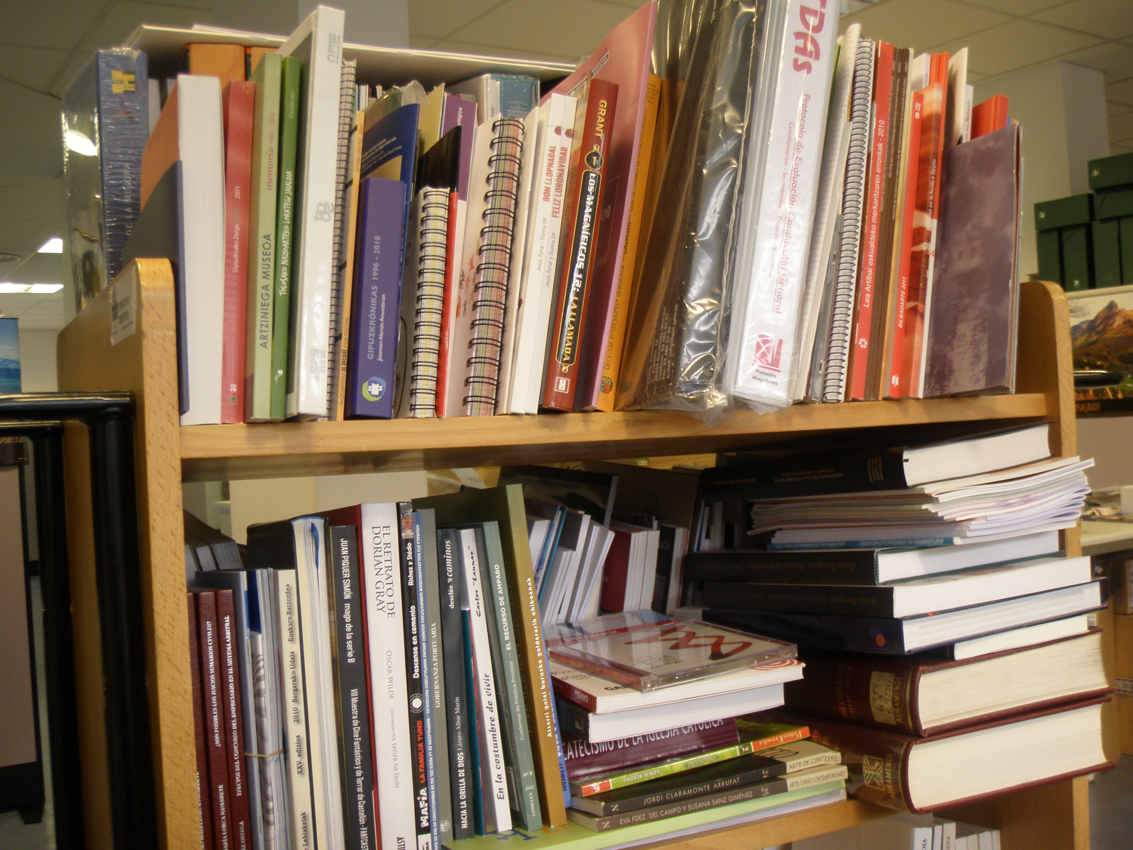 Liburuak